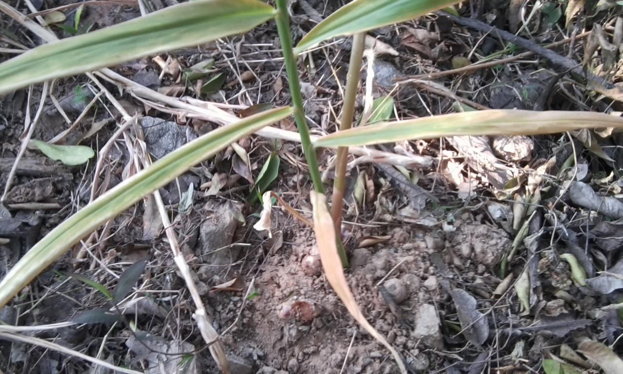 नेपाली: अदुवाको बोट